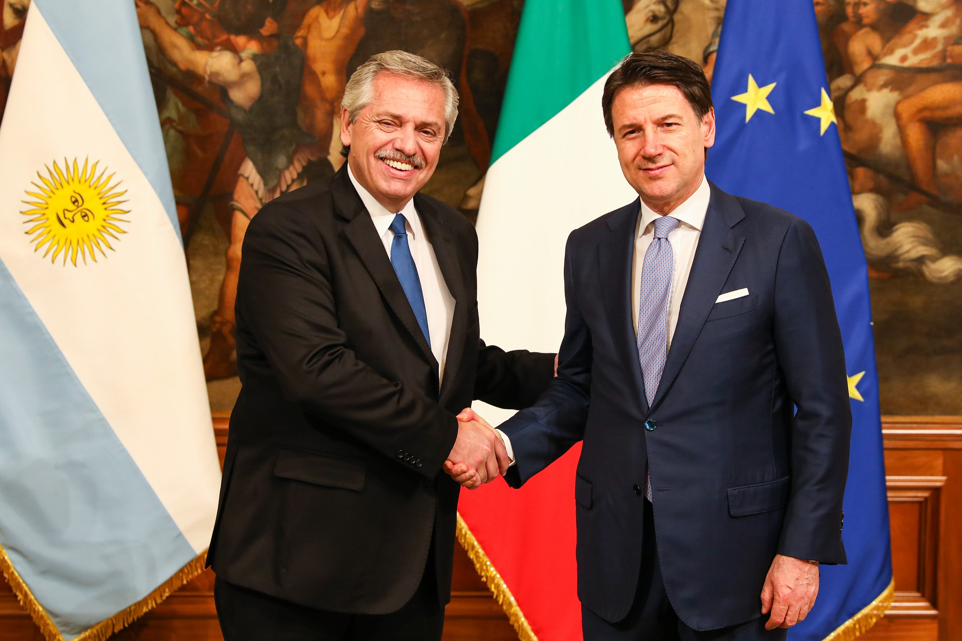 El presidente Alberto Fernández se reunió con el presidente del Consejo de Ministros de Italia, Giuseppe Conte, en el Palacio Chigi de Roma.